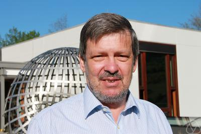 Foto di Wolfgang Kühnel